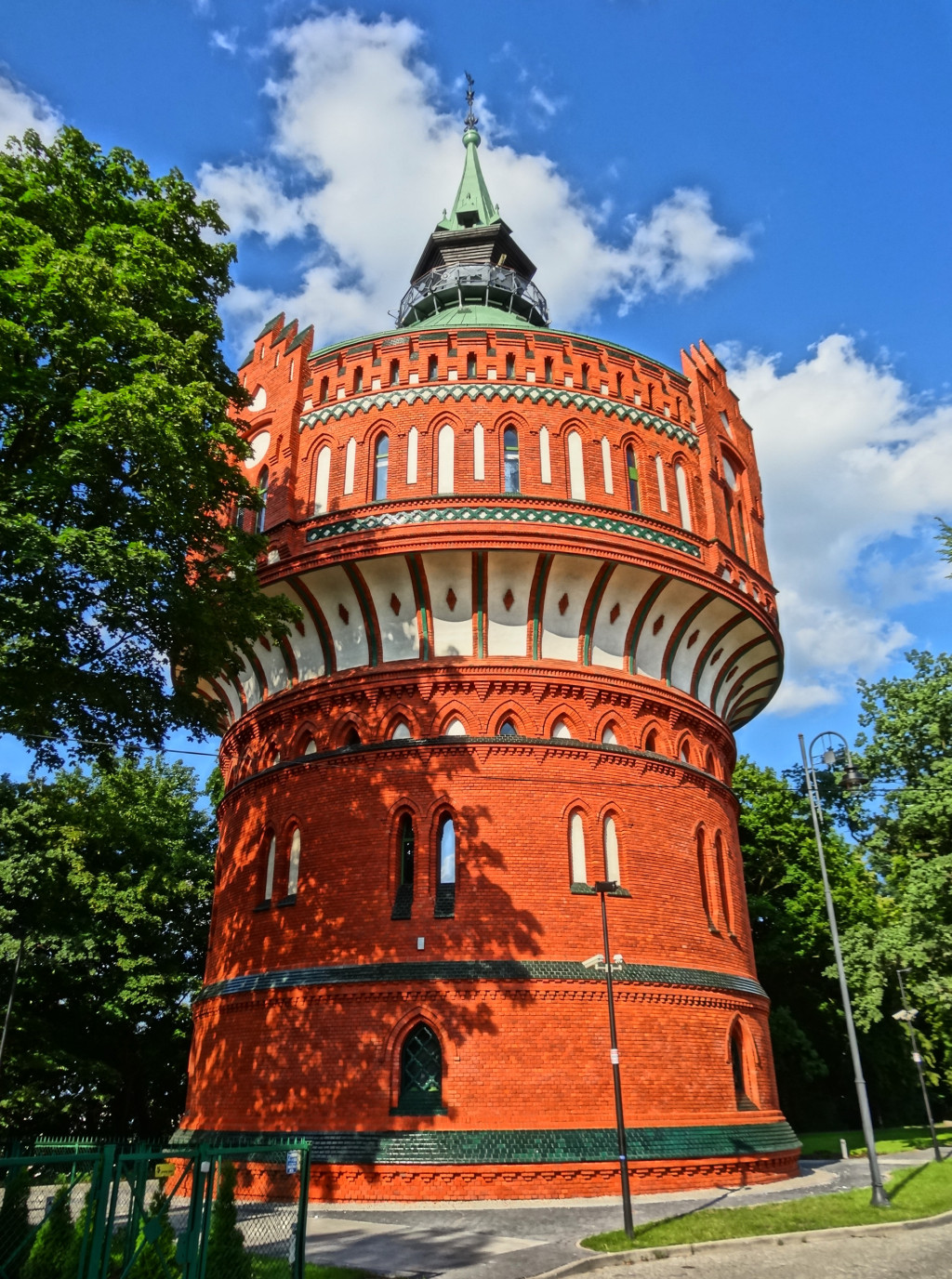 Wieża ciśnień w Bydgoszczy przy ul. Filareckiej, zbud. w 1900 roku, mieści Muzeum Wodociągów i Kanalizacji, a na szczycie galerię widokową